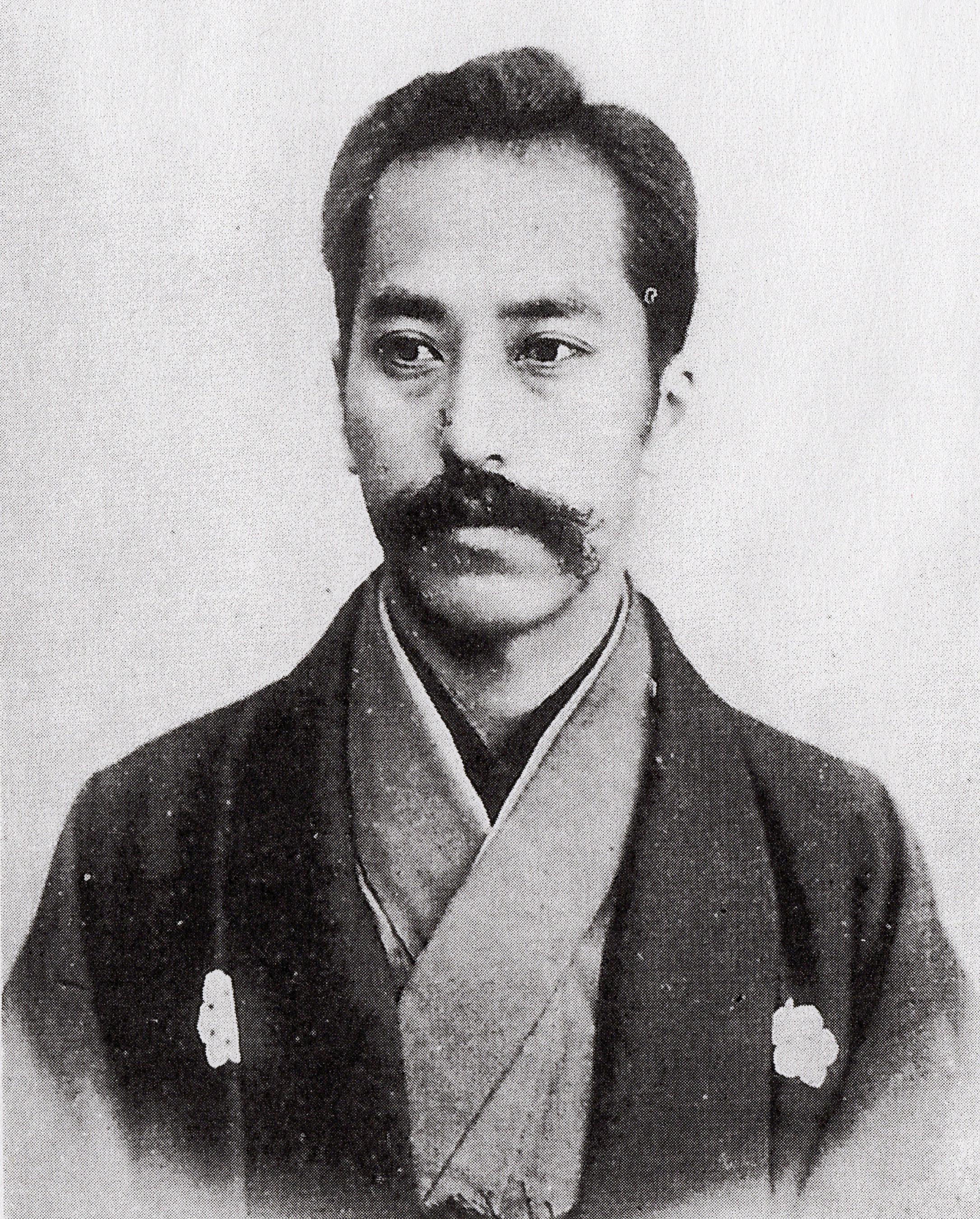 陸奥守山藩最後の藩主・松平頼之の肖像写真。